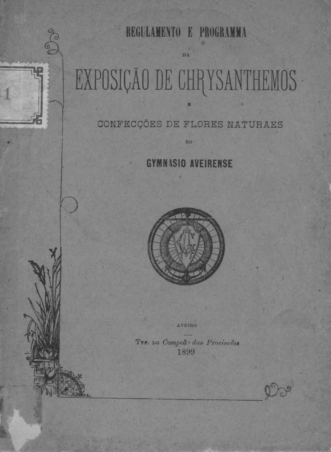 Regulamento de uma exposição de crisântemos organizada pelo Ginásio Aveirense, exibindo o respectivo logotipo.